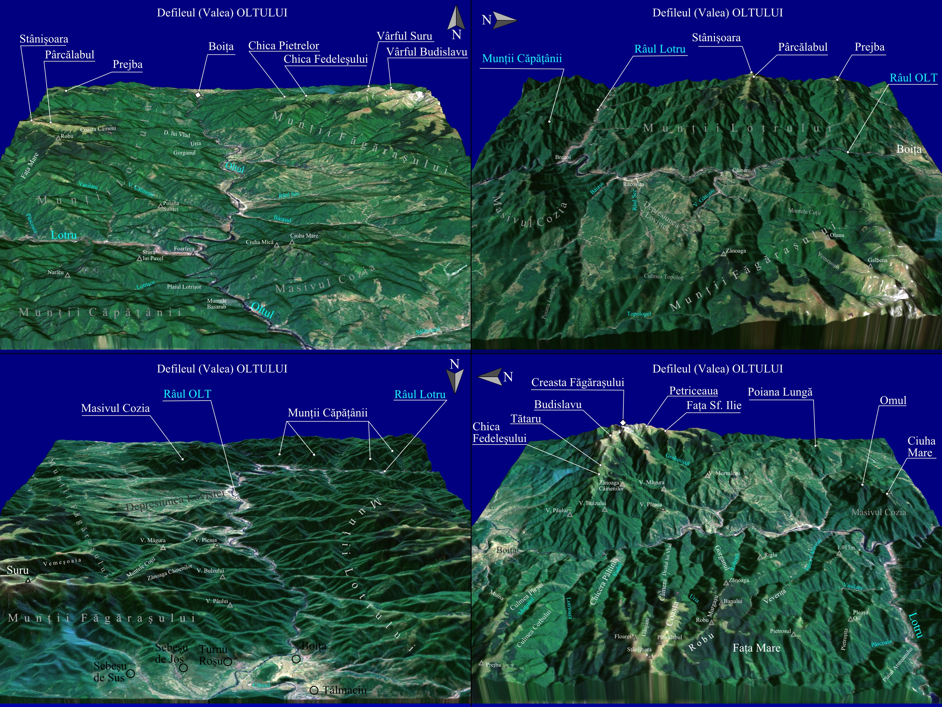 Harta reliefului a Defileul Oltului. Imagine realizată cu 3DEM şi Inkscape folosind Texte şi Background al reliefului. Pentru modificări ale imaginii se urmează paşii: 1. Se descarcă fişierul Background şi Textele. 2. Se suprapun Textele peste Background în Inkscape. 3. Se fac modificările în Inkscape. 4. Se exportă imaginea noua formată din Inkscape într-un fişier PNG, după care se transformă PNG-ul în JPG. 5. Se încarcă noua imagine JPG, cu upload. 6. Se încarcă noul fişier SVG cu Texte, cu upload.